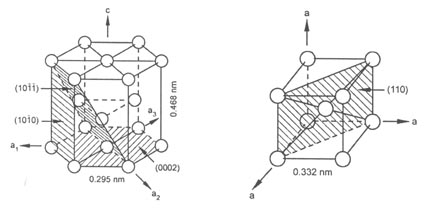 Maille alpha et bêta du titane, image réalisée par Ghysels Philippe, d'après les données crystallographiques de JOHNSEN (O.), Minerals of the World, Princeton (United States) : Princeton University Press, 2002, 438 p.